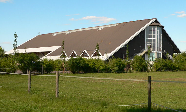 Glaubenshalle Geistliches Rüstzentrum Krelingen